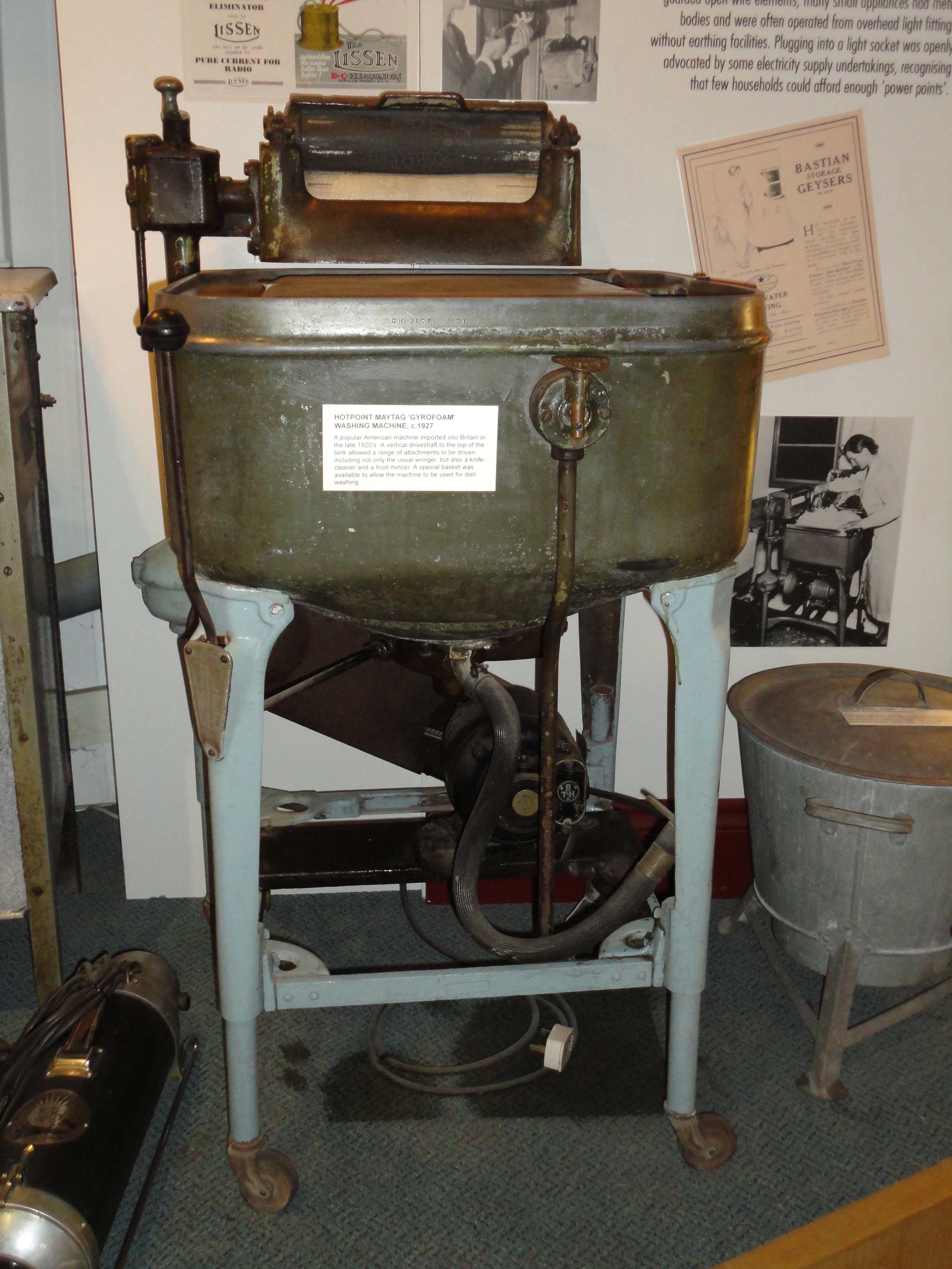 Американская стиральная машина фирмы Maytag 1927 года выпуска.